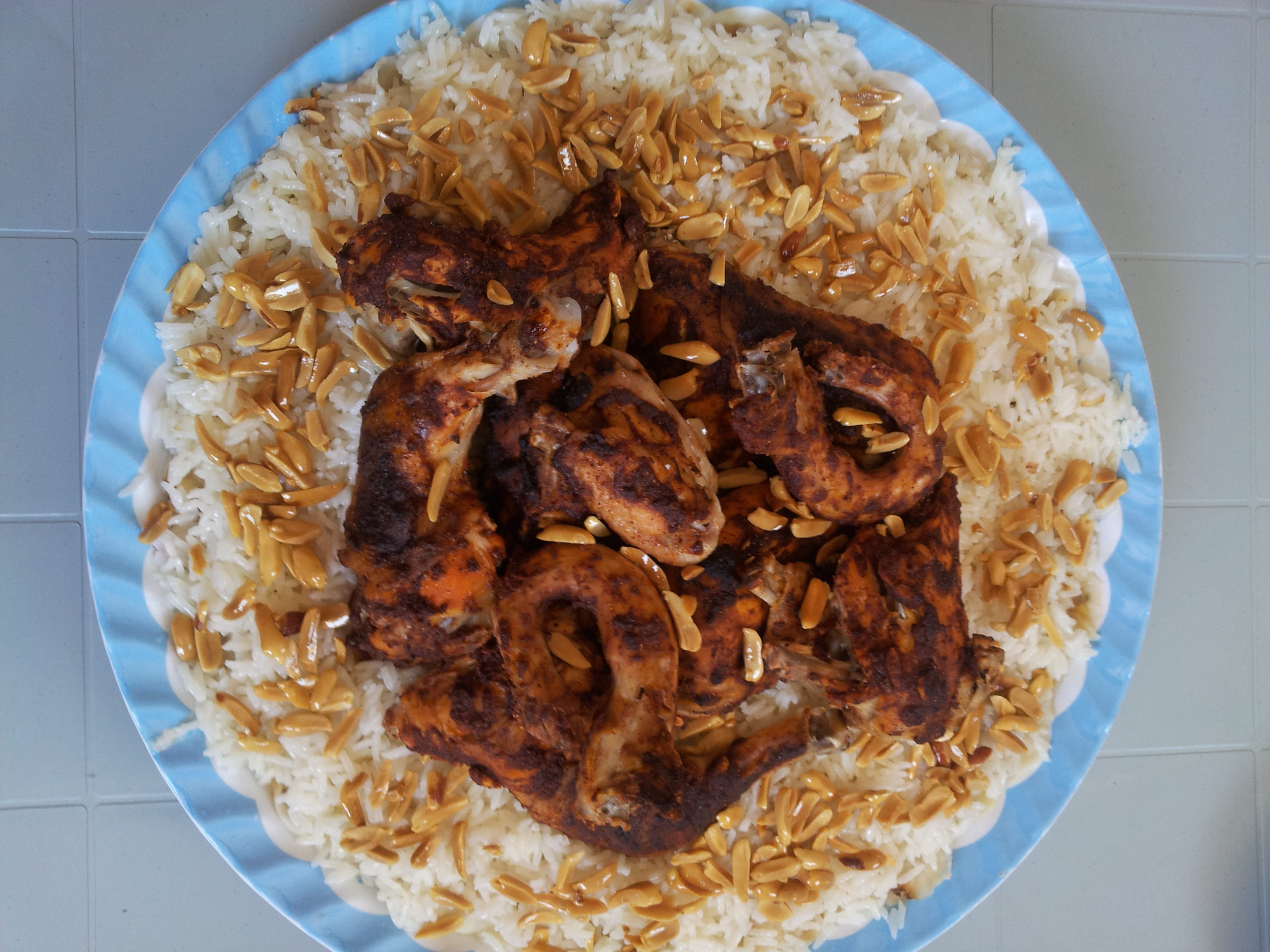 تتكون الأكلة الشعبية الفلسطينية من خبز الصاج مع الرز المغمور بمرق الدجاج مع إضافة المكسرات